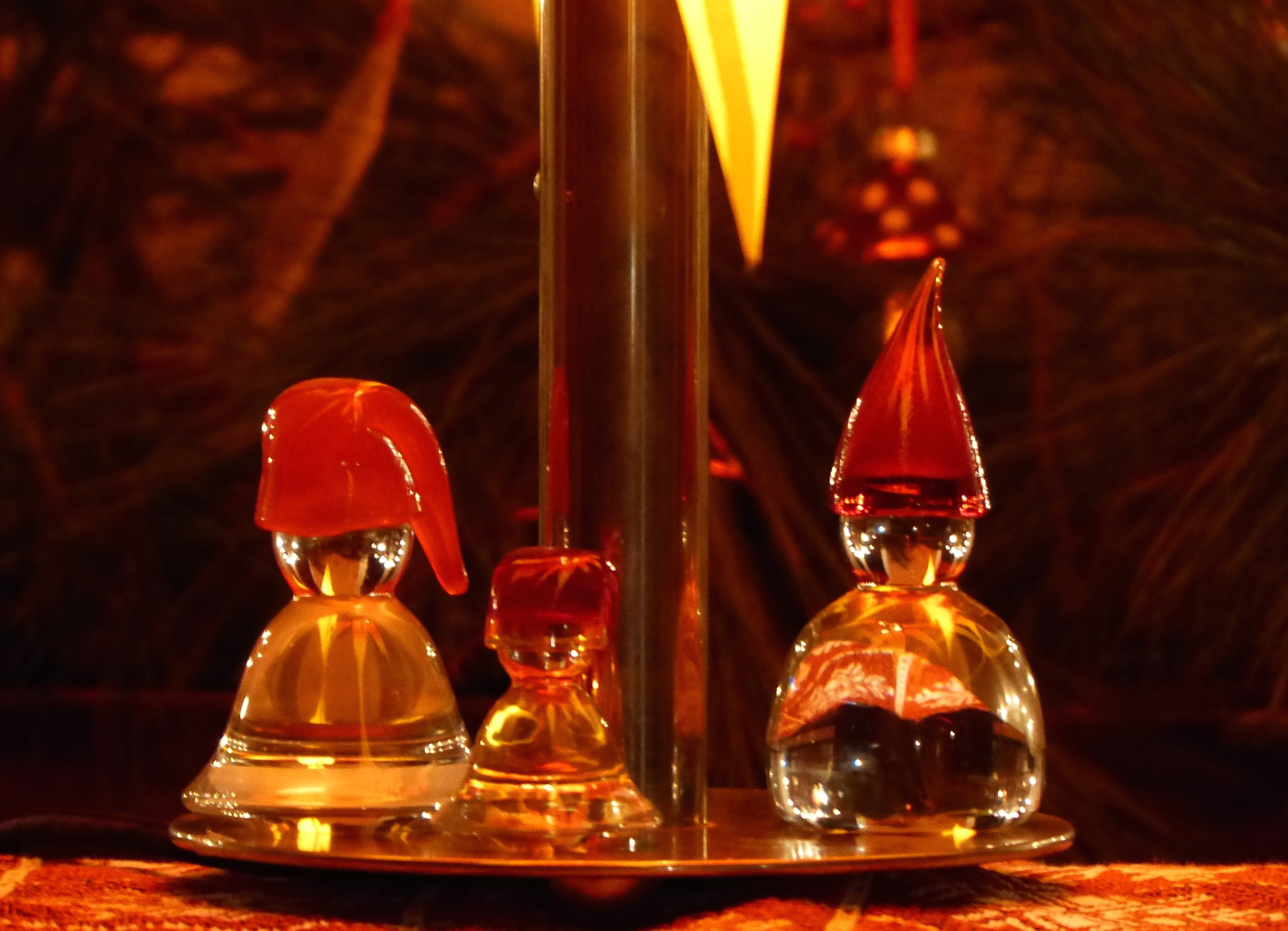 Weihnachtliche Nisse-Familie (Norwegen)